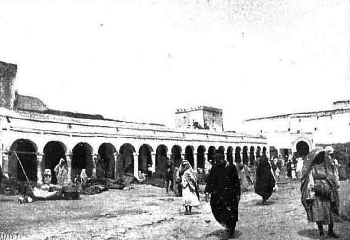 Zoco de Larache, junio de 1911.